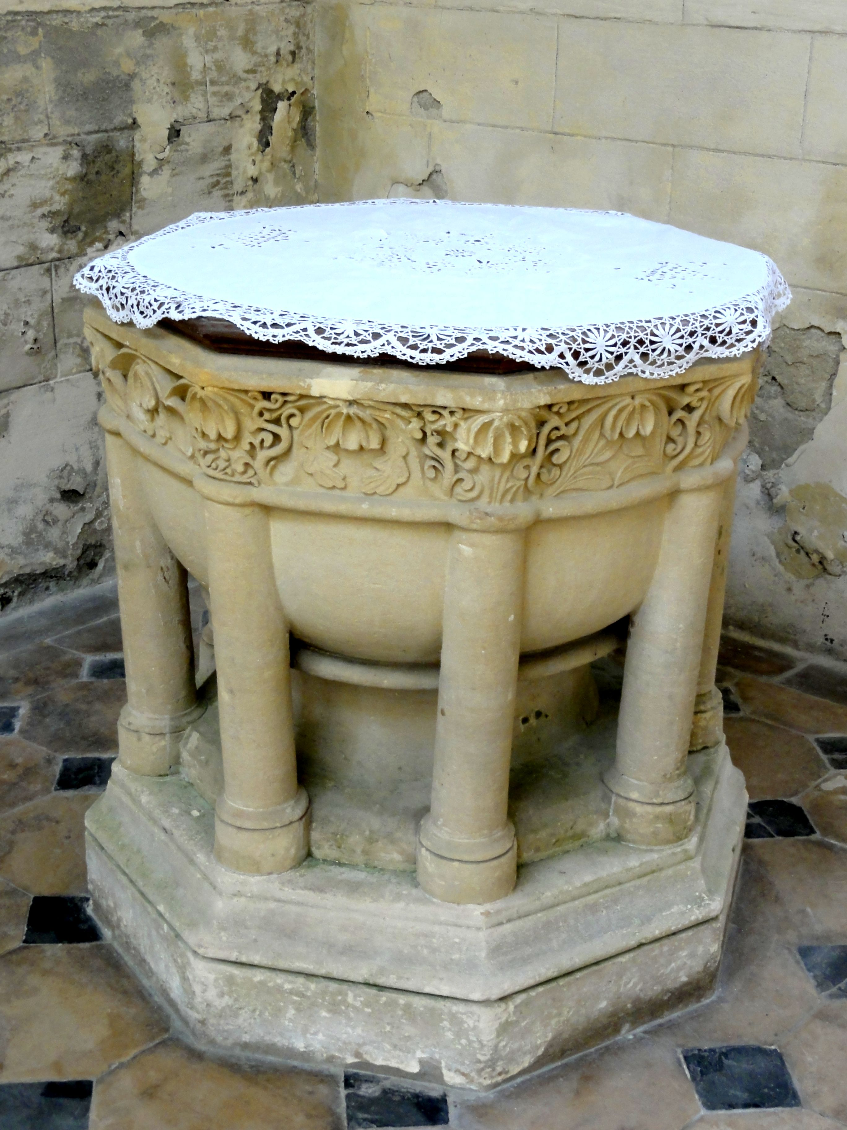 Fonts baptismaux.